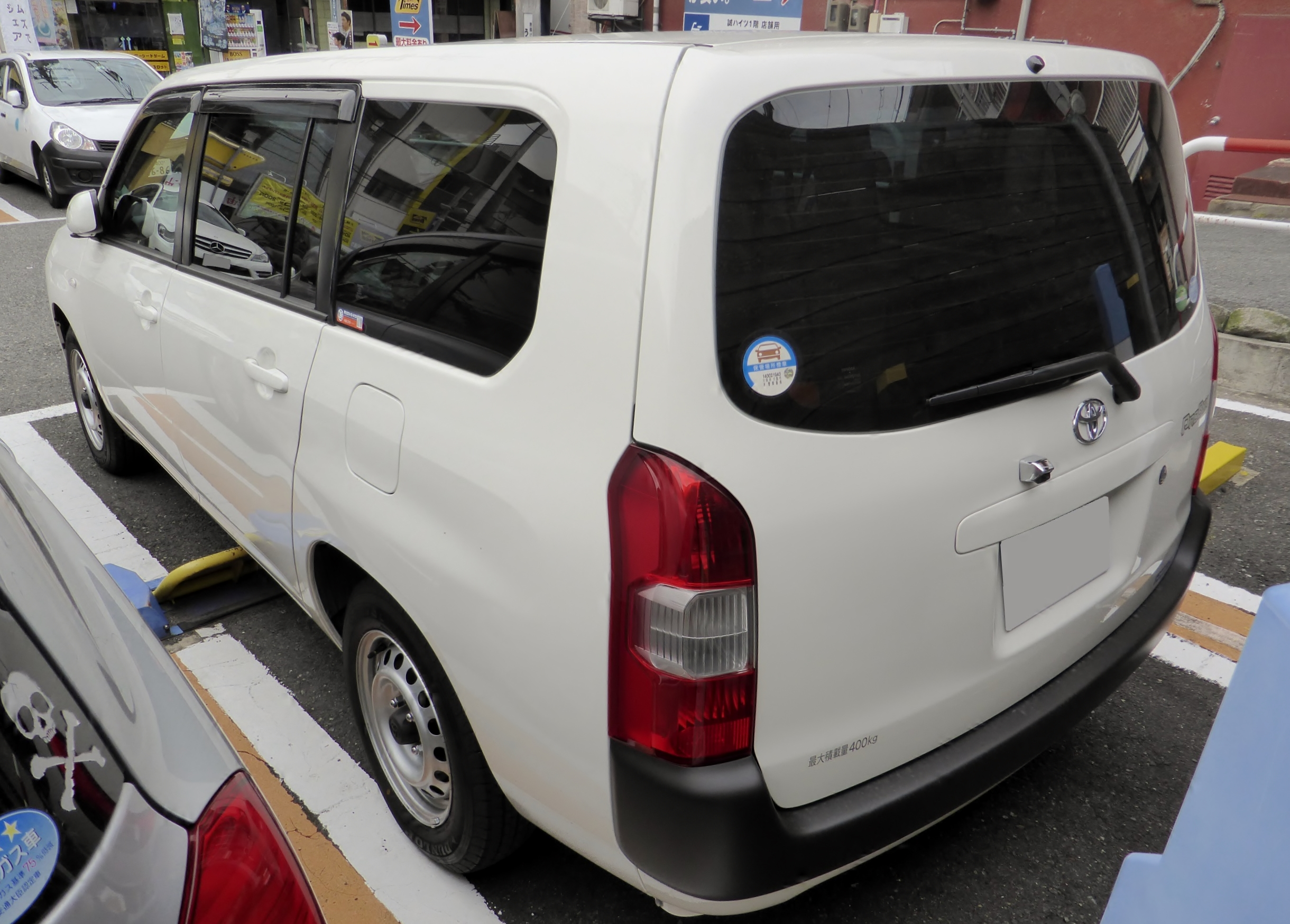 NSP160V後期型トヨタ・プロボックスDXをリアから撮影。